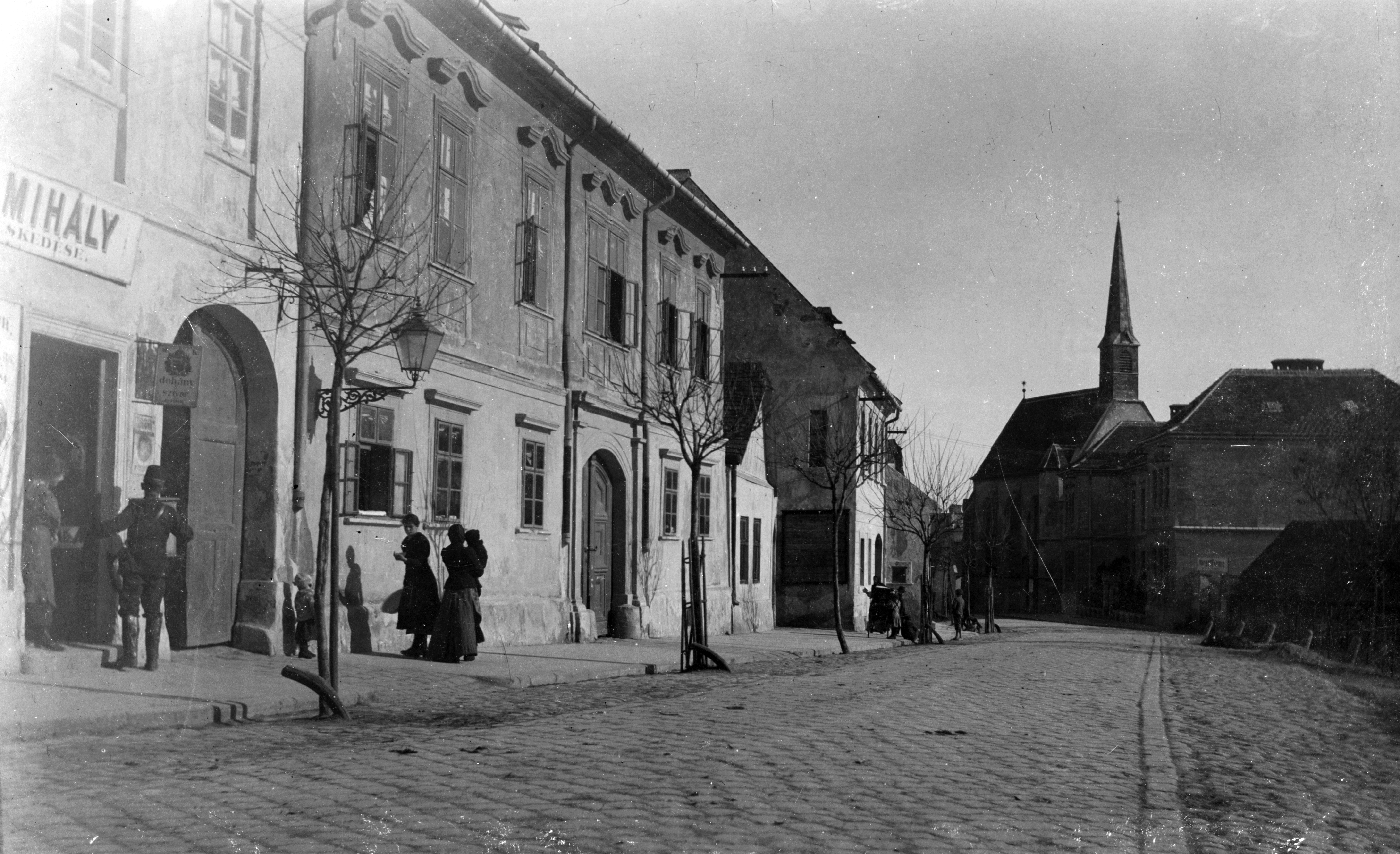 Bécsi út, háttérben a Keresztelő Szent János-templom. Location: Sopron, Hungary Tags: cobblestones, street view, gas lamp Title: Bécsi út, háttérben a Szent János-templom.